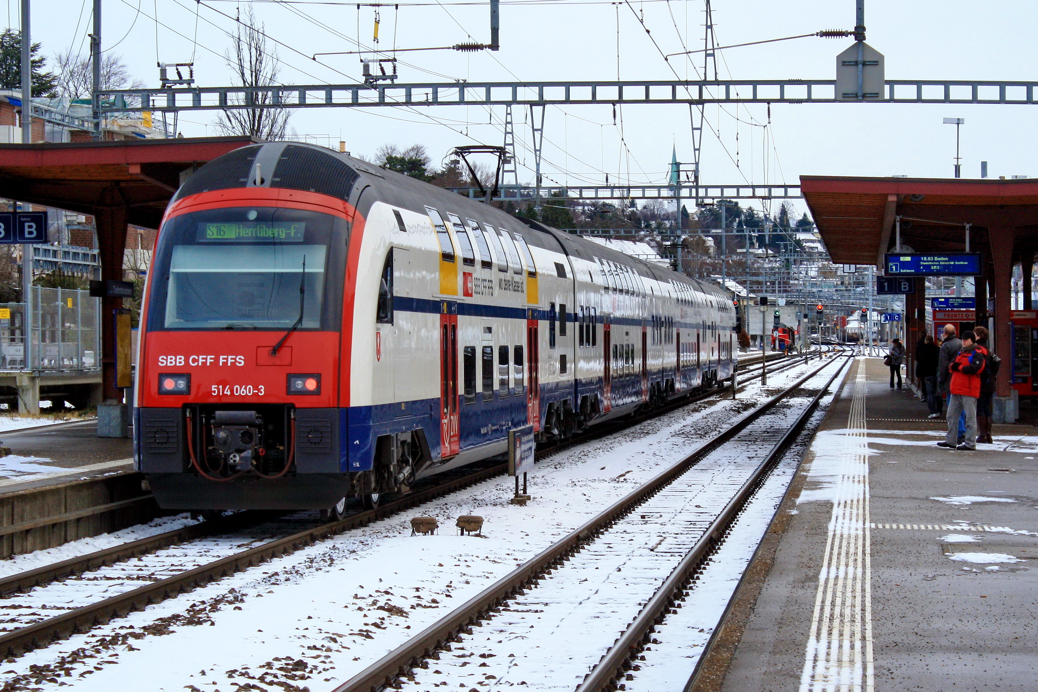 Zürich-Tiefenbrunnen train station, S-Bahn Zürich line S16 towards Herrliberg-Feldmeilen to the right.